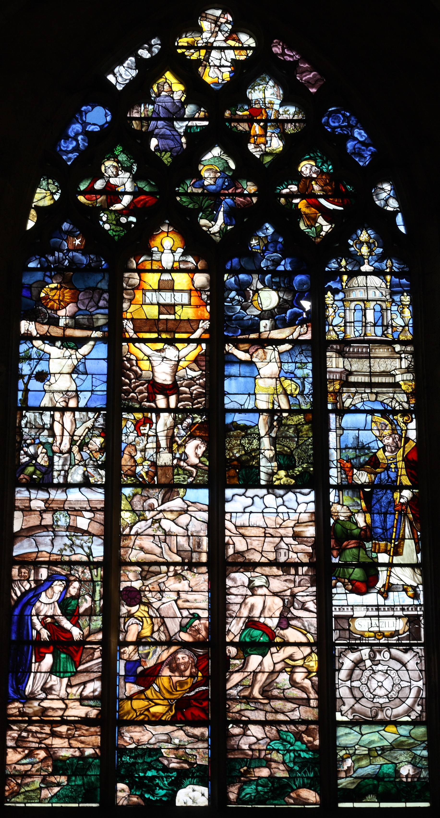 Bleiglasfenster in der katholischen Kirche Saint-Basile in Étampes, Darstellung: Kreuzigung